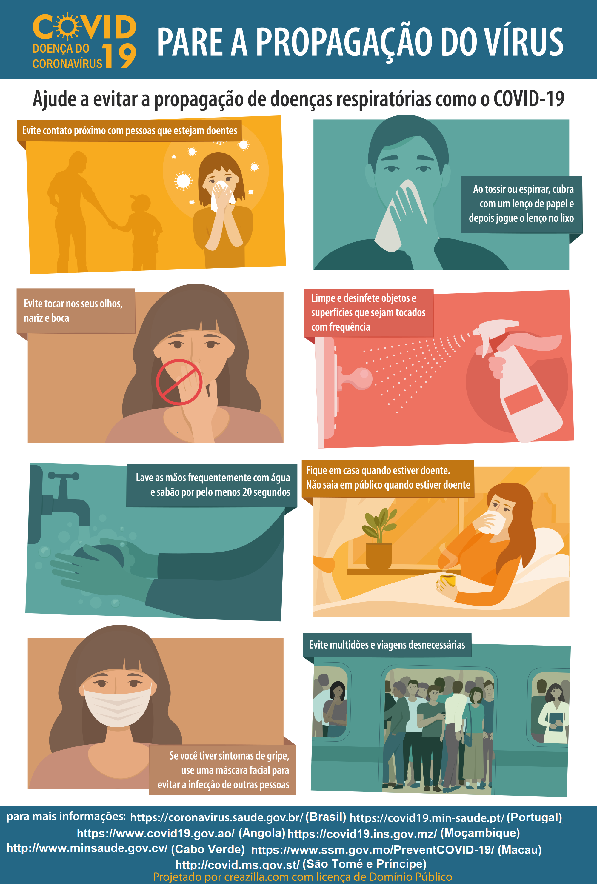 Doença do coronavírus COVID-19 PARE A PROPAGAÇÃO DO VÍRUS Ajude a evitar a propagação de doenças respiratórias como o COVID-19. Evite contato próximo com pessoas que estejam doentes. Ao tossir ou espirrar, cubra com um lenço de papel e depois jogue o lenço no lixo. Evite tocar nos seus olhos, nariz e boca. Limpe e desinfete objetos e superfícies que sejam tocados com frequência. Lave as mãos frequentemente com água e sabão por pelo menos 20 segundos. Fique em casa quando estiver doente. Não saia em público quando estiver doente. Se você tiver sintomas de gripe, use uma máscara facial para evitar a infecção de outras pessoas. Evite multidões e viagens desnecessárias. para mais informações